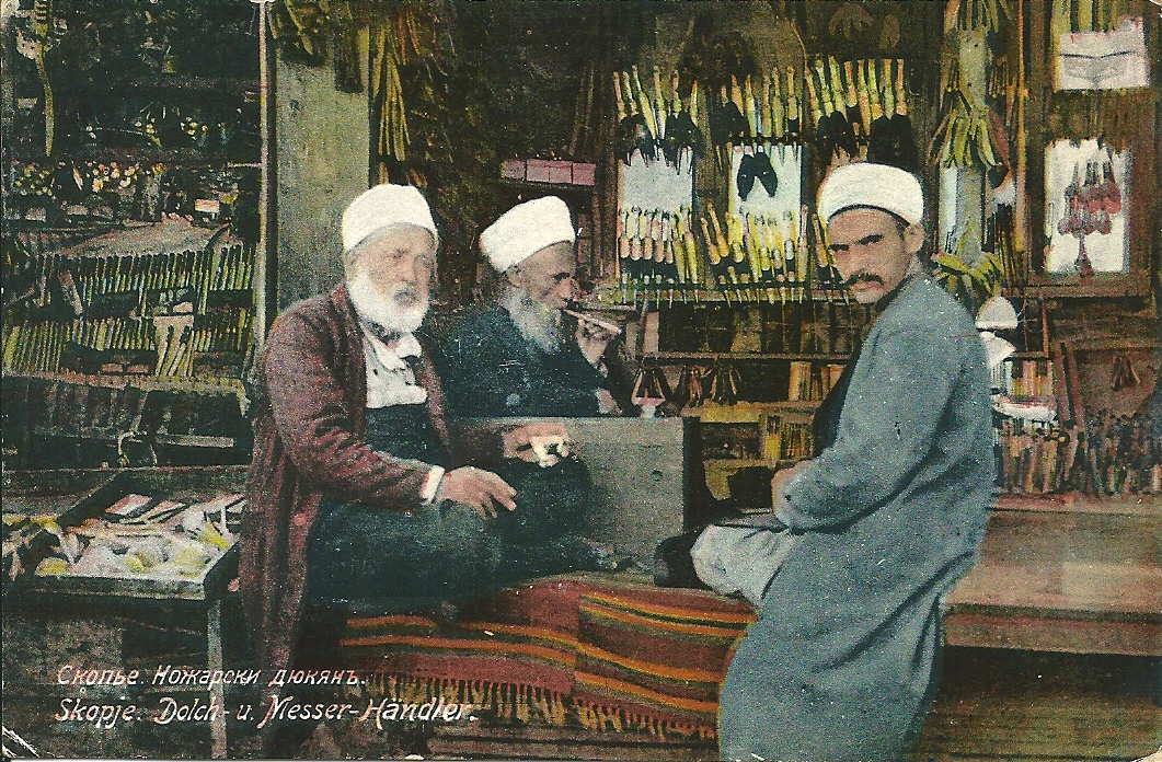 Couteliers à Skopje (Macédoine) avant 1919